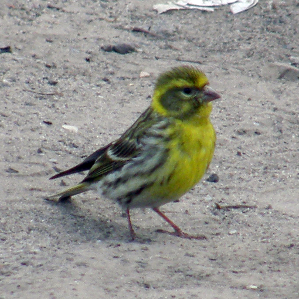 г. Кролевец